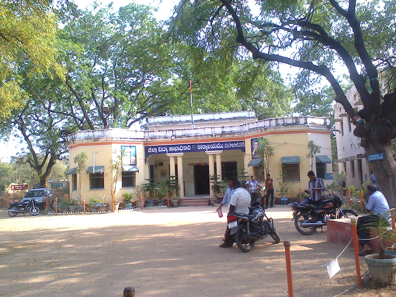 జిల్లా విద్యాశాఖాధికారి కార్యాలయం, మహబూబ్ నగర్